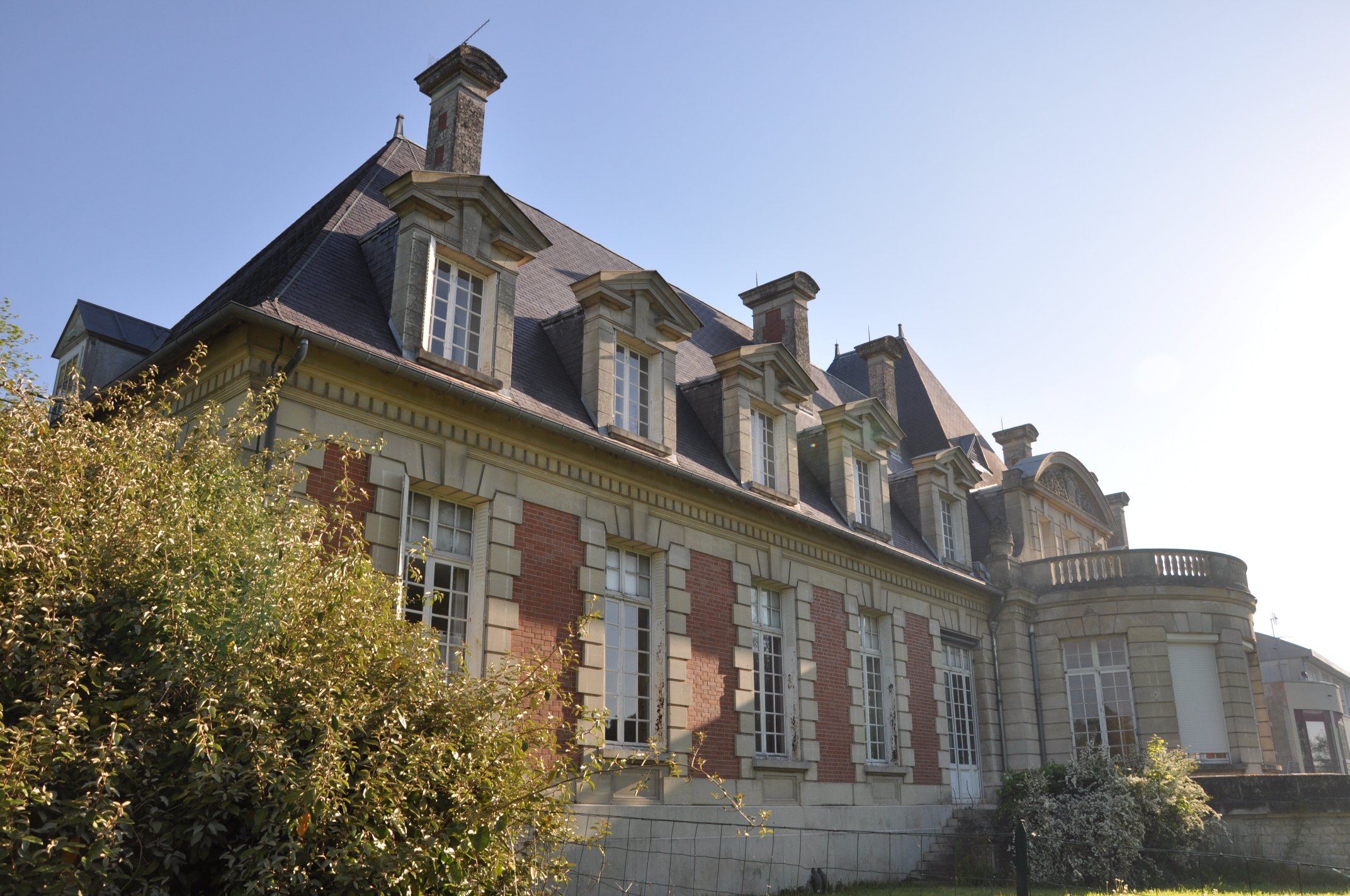 Château de Montois